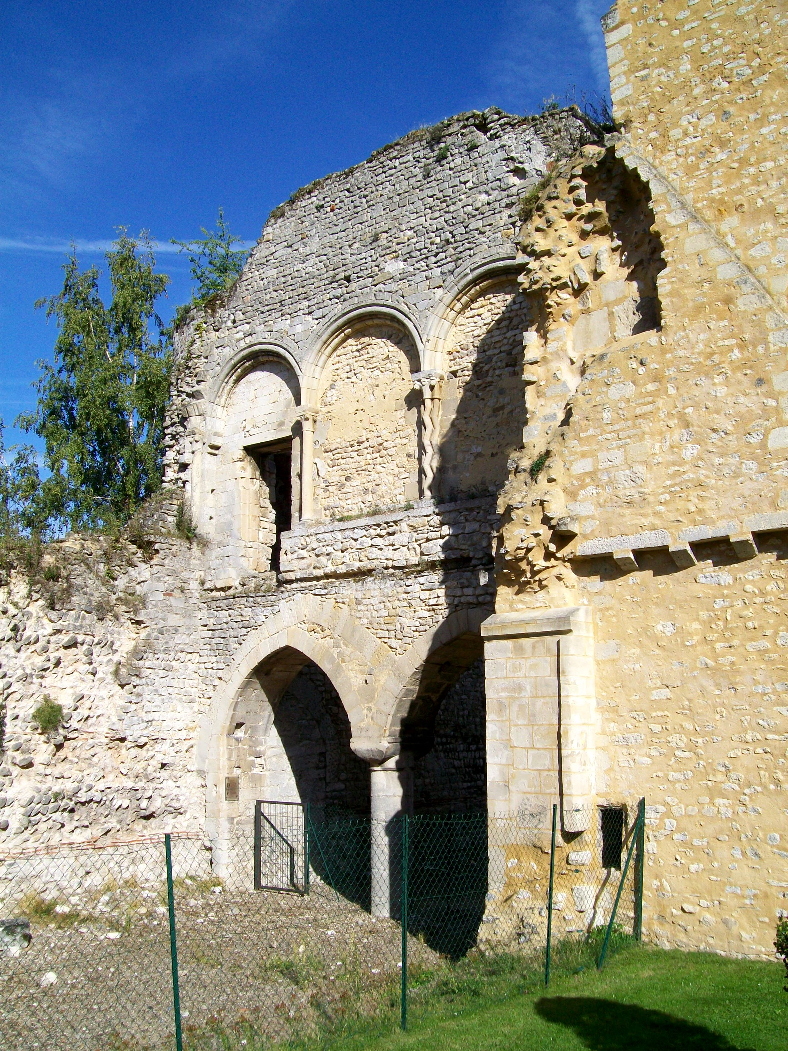 Ruines du château royal : vestiges de la cuisine, au rez-de-chaussée, et de la salle des maréchaux, à l'étage, dans le même corps de bâtiment qui abritait également la chapelle royale Saint-Denis.